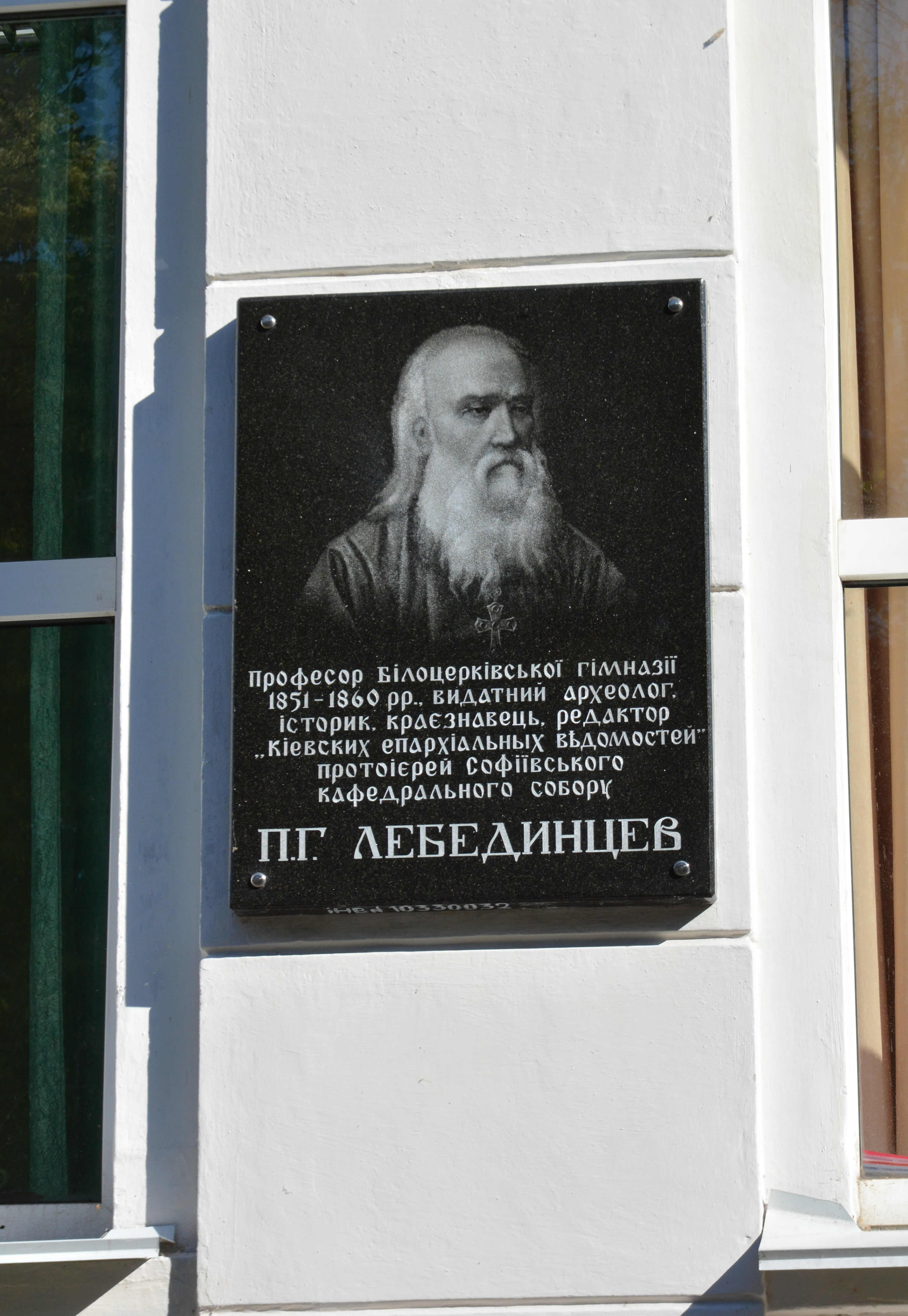 Пам'ятна дошка Петру Лебединцеву на північному крилі головної будівлі Білоцерківського національного аграрного університету. Біла Церква, пл. Соборна 8/1.